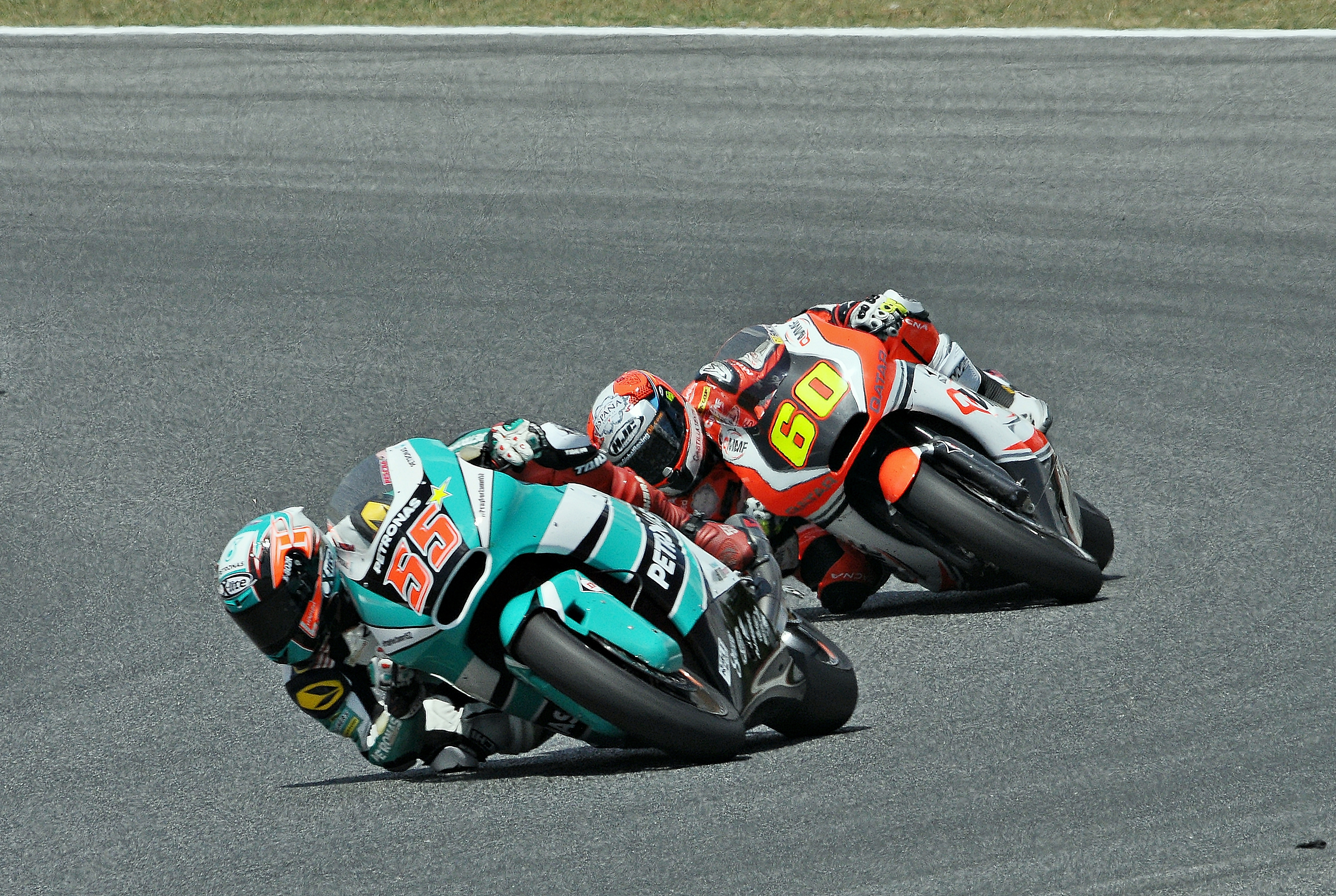 gran premio de cataluña